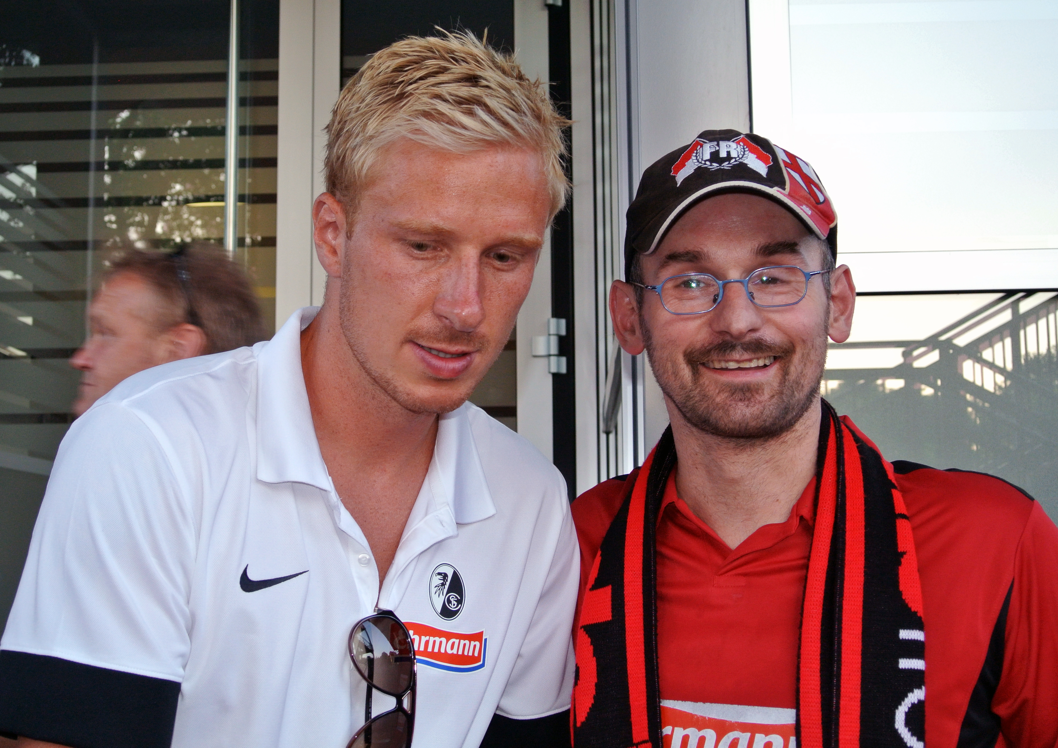 Mike Hanke (links) mit Fan Bernd Armbruster nach dem Saisoneröffnungsspiel des SC Freiburg gegen Athletico Bilbao am 27. Juli 2013